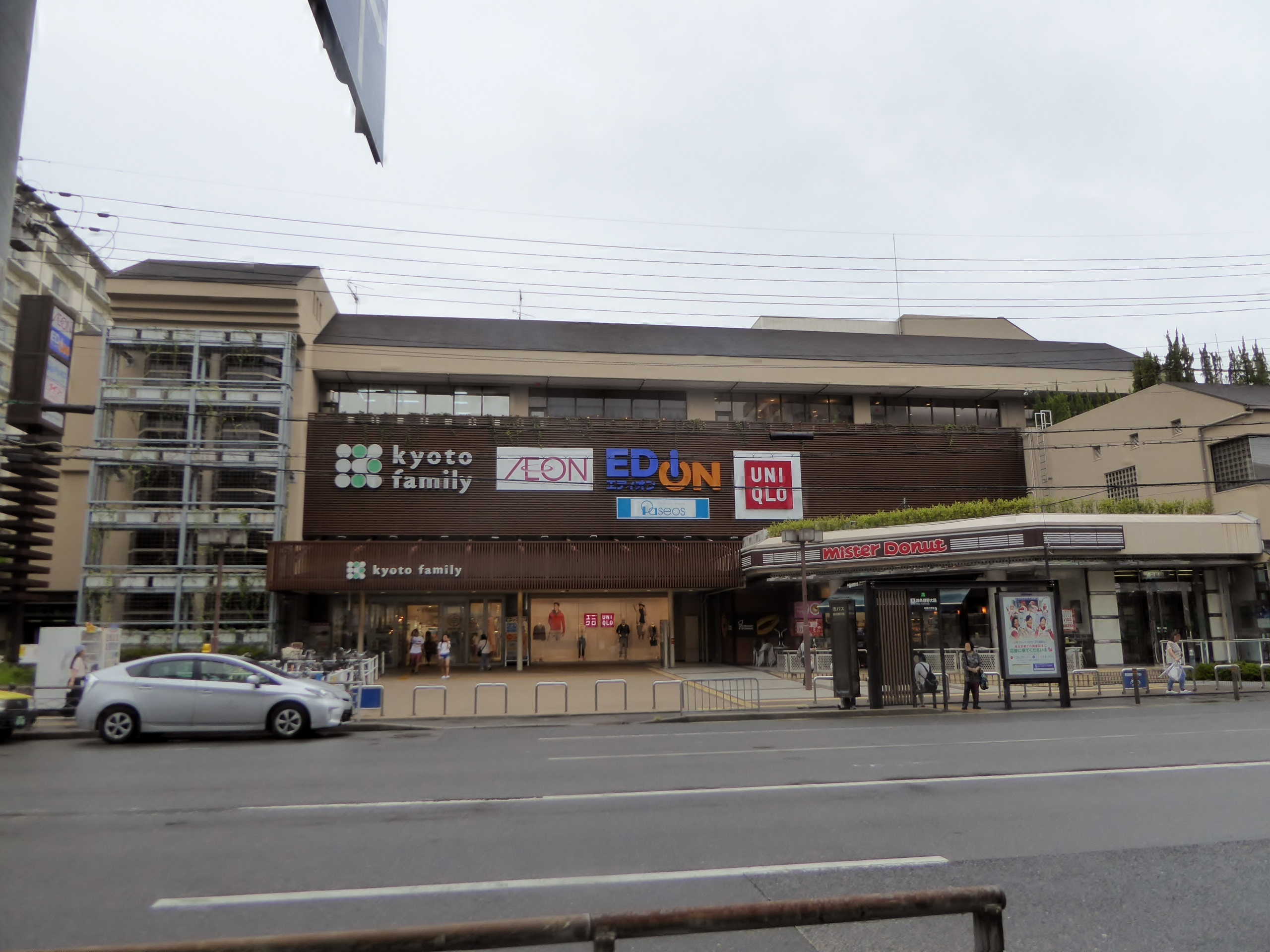 京都ファミリーを撮影。